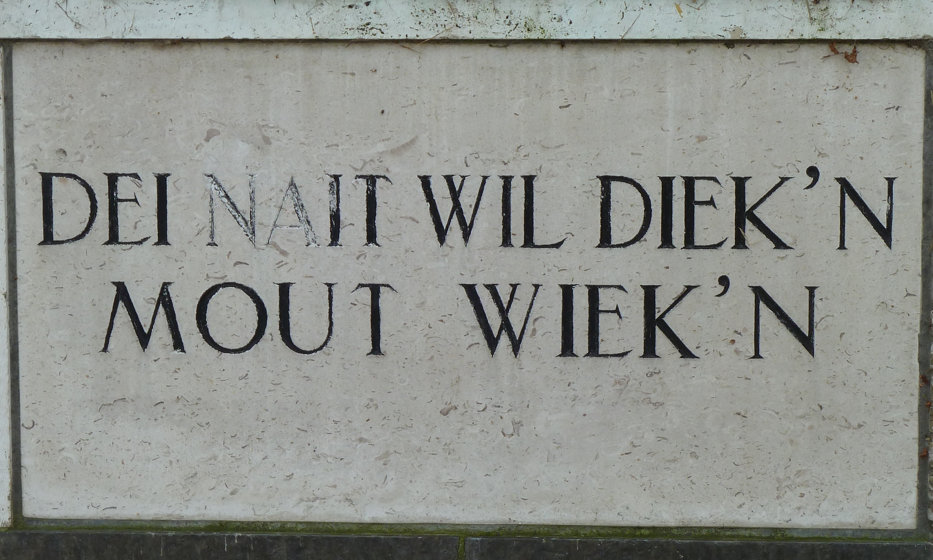 Onderdendam, opschrift op waterschapshuis (waterschap Hunsingo).